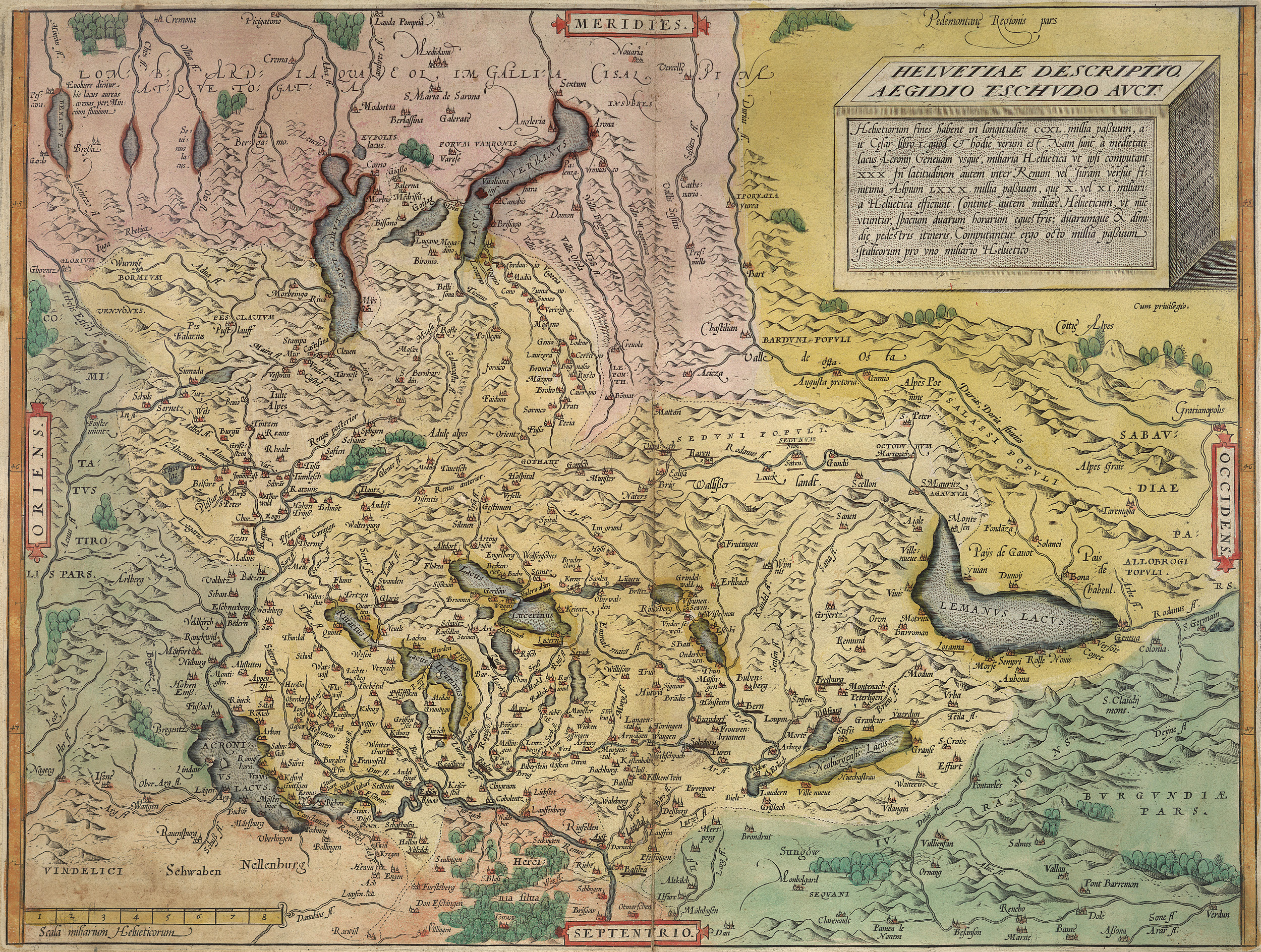 Aegidius Tschudi : Schweizerkarte 1538 De prisca ac vera Alpina Rhaetia. Basileae: Isingrinius, 1538. 8 H HELV IV, 7600Aegidius Tschudi: Helvetiae descriptio. Antwerpen, 1573. Massstab ca. 1:1'200'000. Kupferstich, 45x35cm.Nachdruck der Karte aus dem Atlas Theatrum Orbis Terrarum von Abraham Ortelius. Antwerpen, 1573. (Signatur: !HSD! 2 GEOGR 154/a RARA). Süden ist oben.